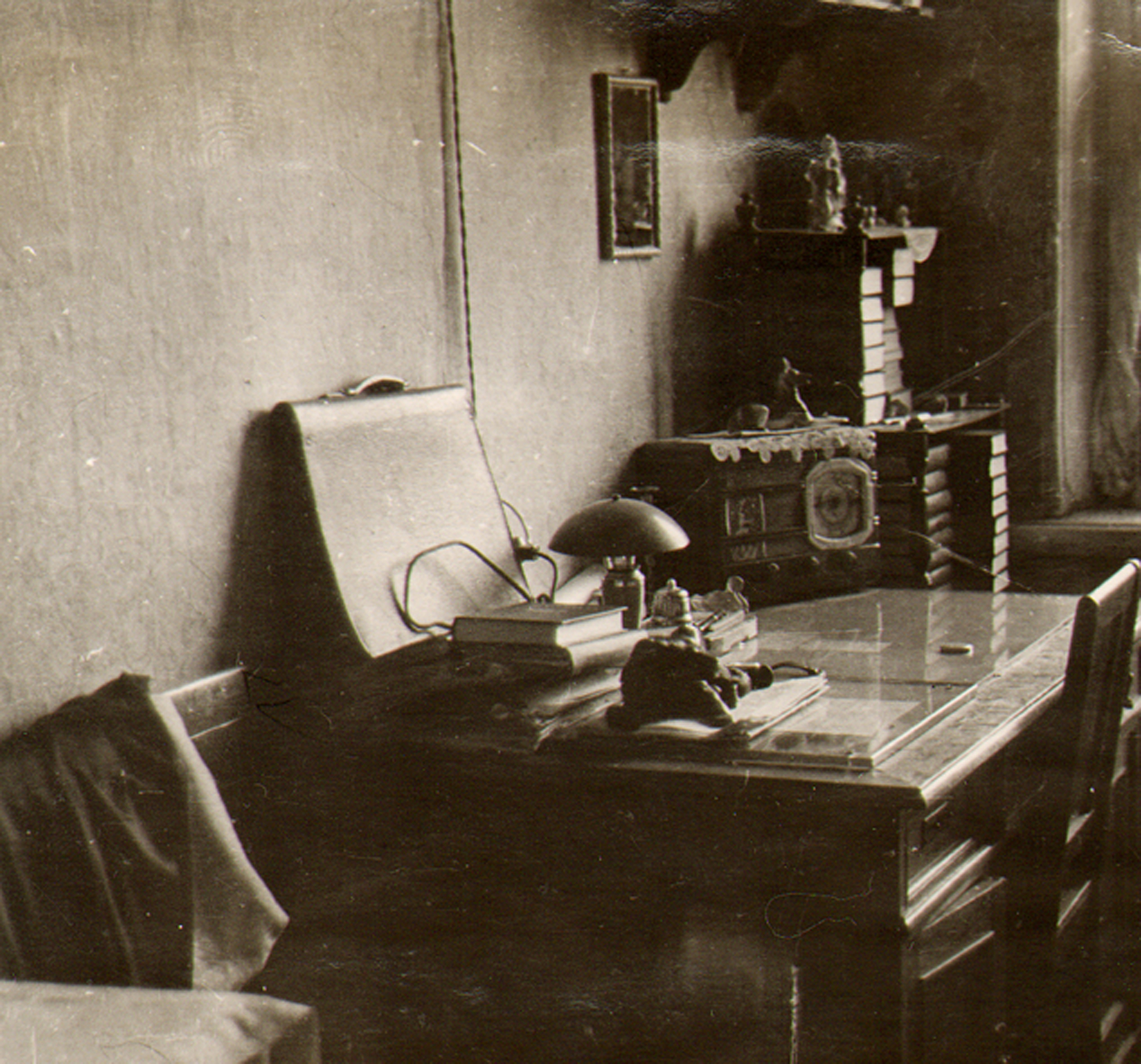 Рабочий кабинет Б. Д. Парыгина на ул. Салтыкова-Щедрина. Ленинград.1957.